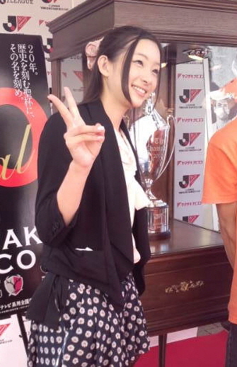 足立梨花